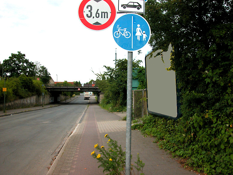 Die Straße «Bamberger Straße» in Benrath, Düsseldorf